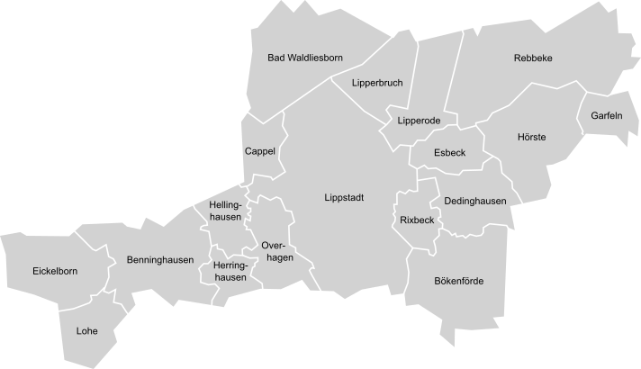 Ortsteile von Lippstadt